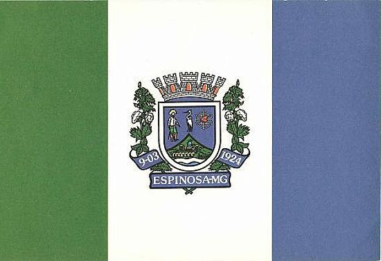 Bandeira do município de Espinosa, Minas Gerais, Brasil.